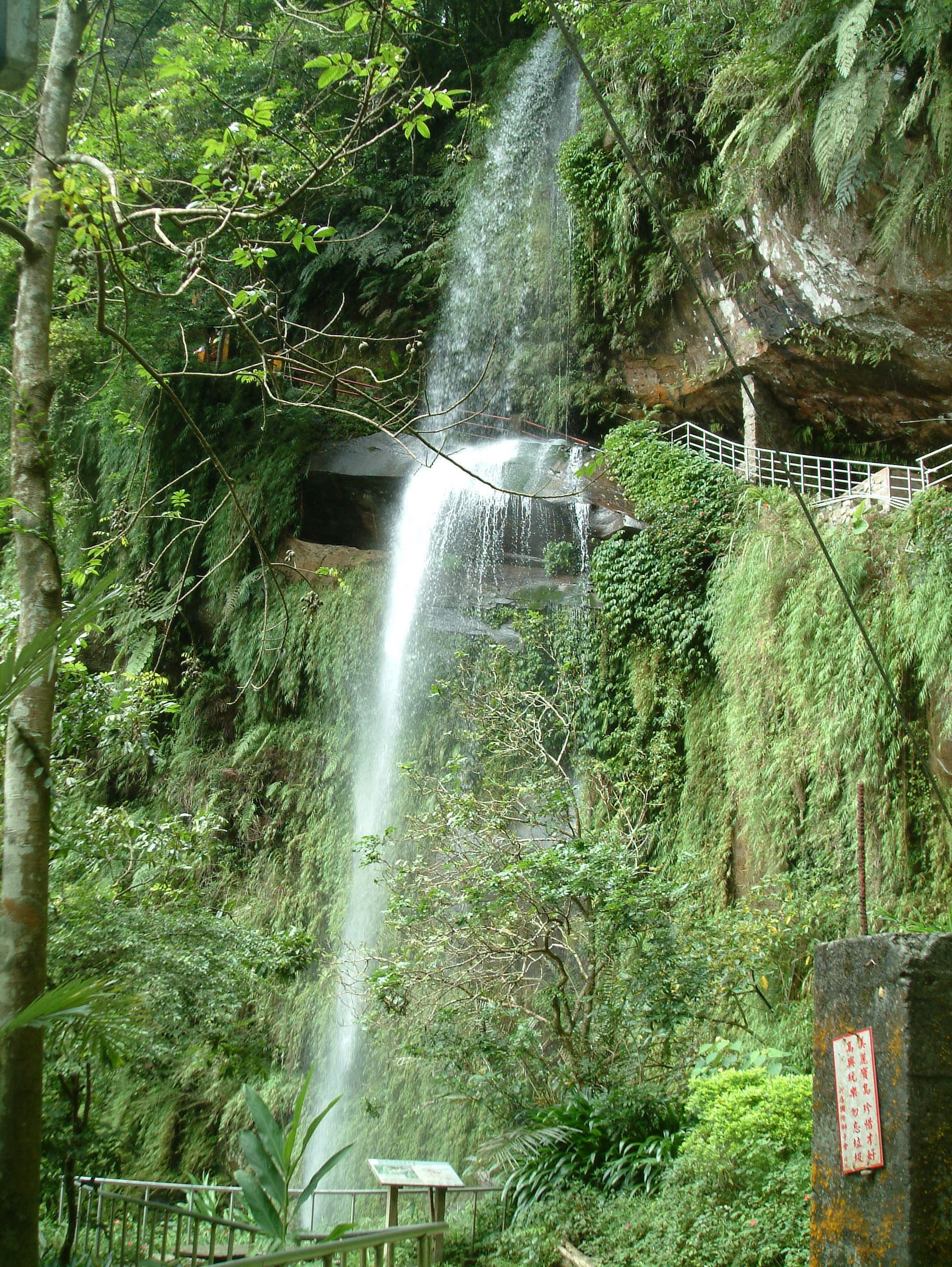 銀河洞瀑布，位於台灣新北市新店區，瀑布中間凹壁處建有廟宇。